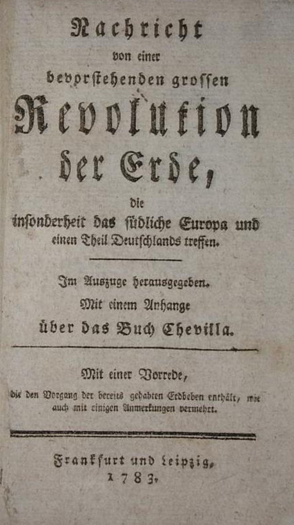 Title page of "Nachricht von einer bevorstehenden grossen Revolution der Erde" by Conrad Siegmund Ziehen